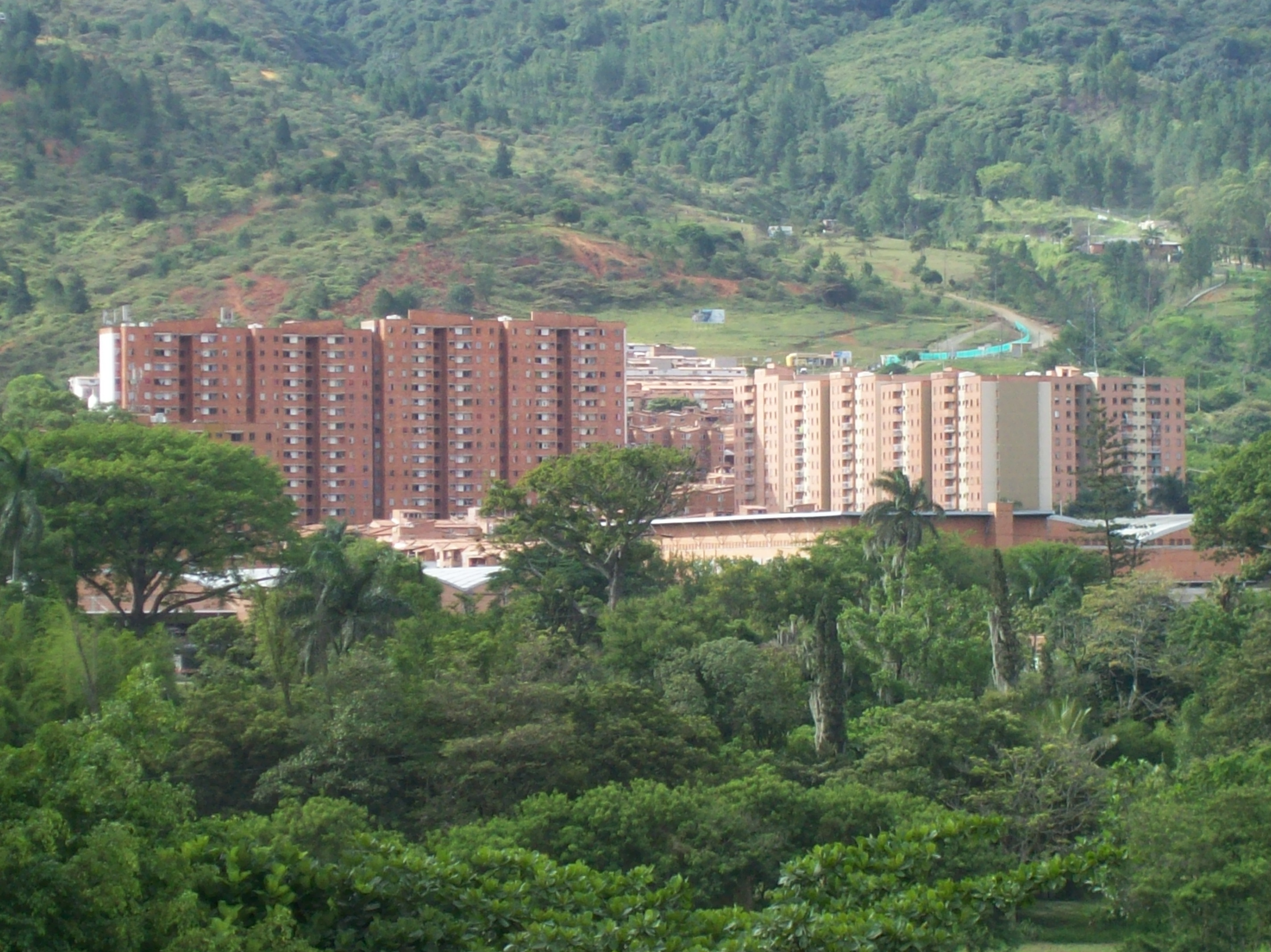 Los de apartamentos mas grandes del municipio de Bello, Antioquia